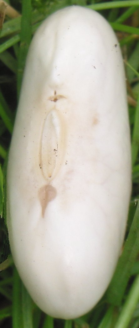 zelfgemaakte foto van pronkboonzaad